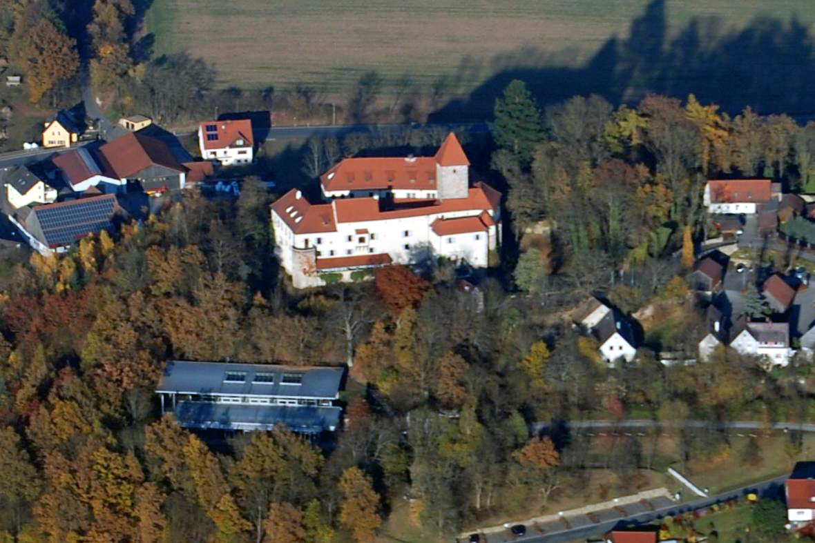 Burg Wernberg, wurde zu einem Hotel umgebaut